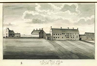 Prospect af Vreile Kloster at see fra den Vester Side